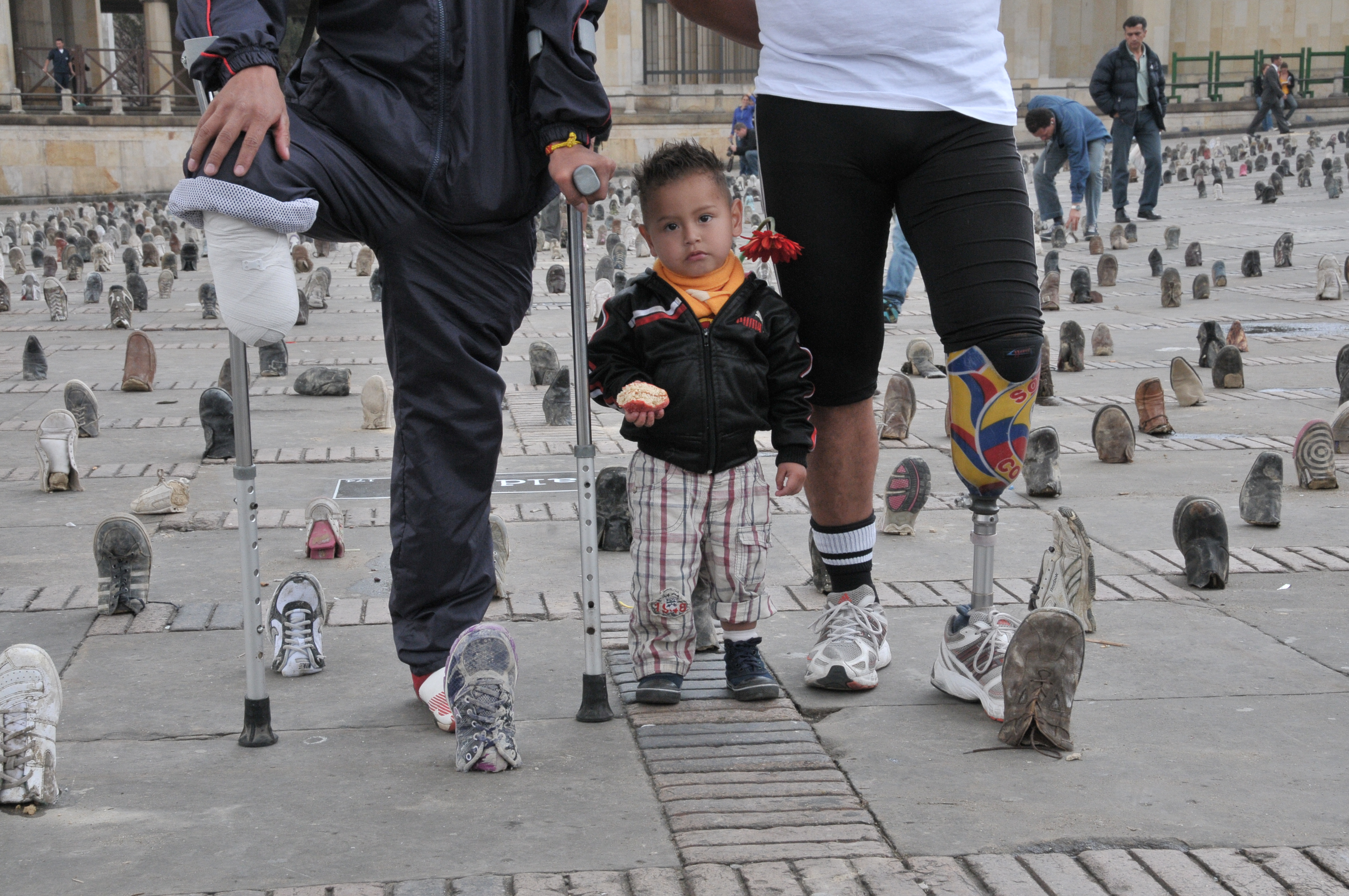 Día Internacional para la Sensibilización sobre las Minas Antipersonal.